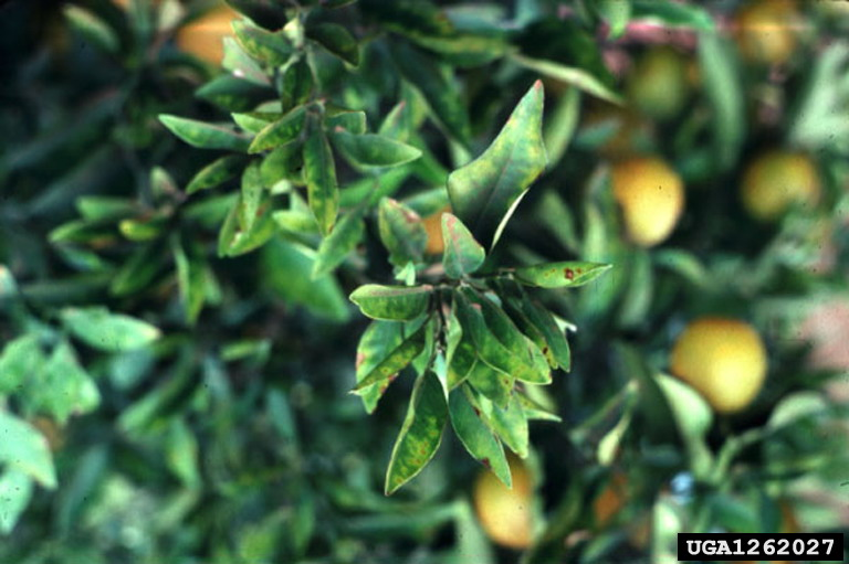 Symptômes de chlorose variéguée due à Xylella fastidiosa sur oranger (Citrus sinensis)